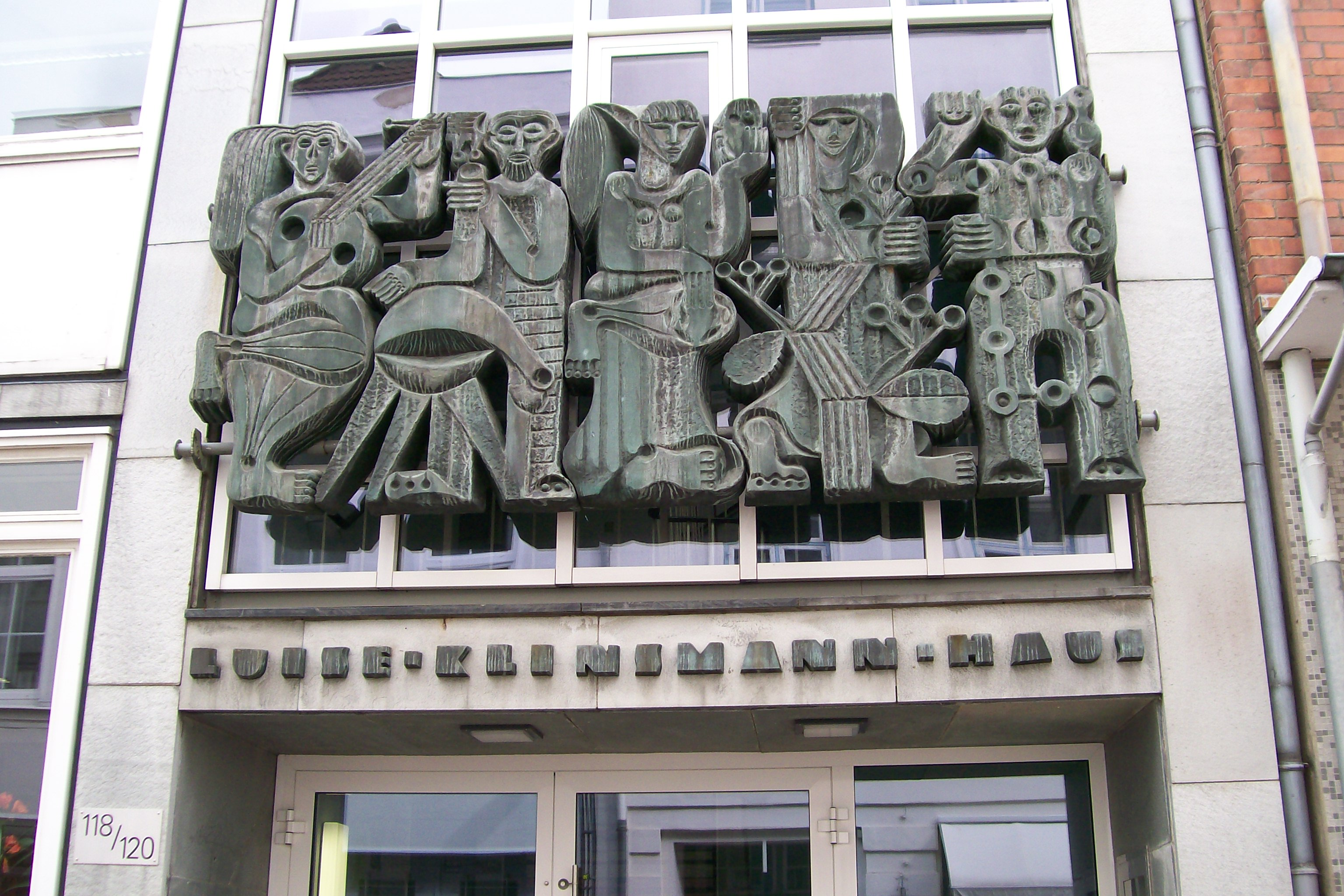 Detail of Volkshochschule Lübeck, Hüxstraße 118/120, called Luise-Klinsmann-Haus, in Lübeck, Schleswig-Holstein, Germany, sculpture by Georg Weiland